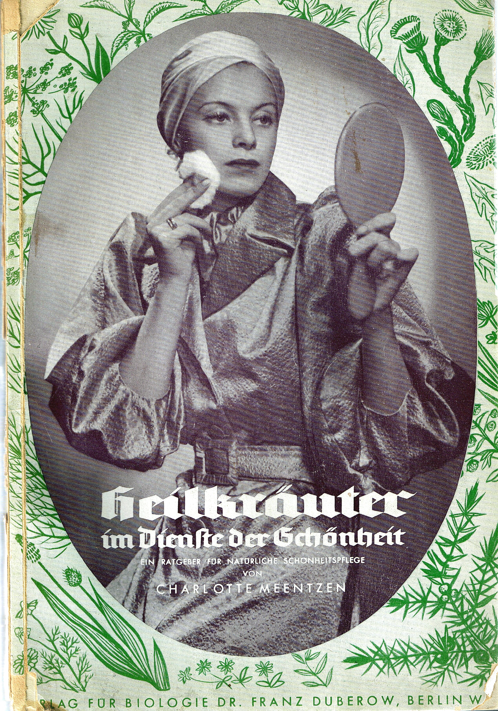 Charlotte Meentzen Buchtitel 1941